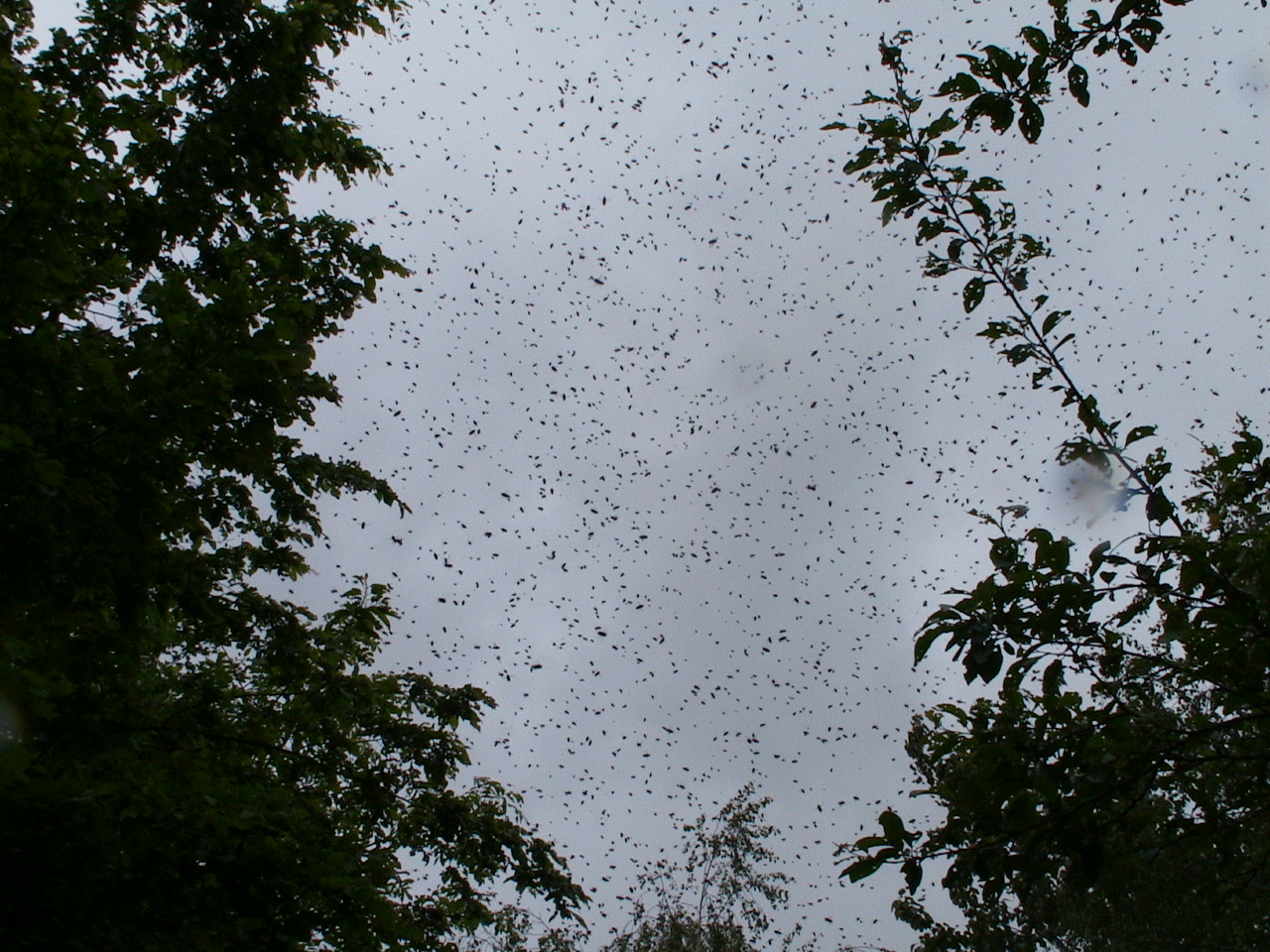 Essaim d'abeille en vol. Photo prise de l'intérieur du nuage, objectif vers le ciel Photo prise le 27 mai par F5ZV